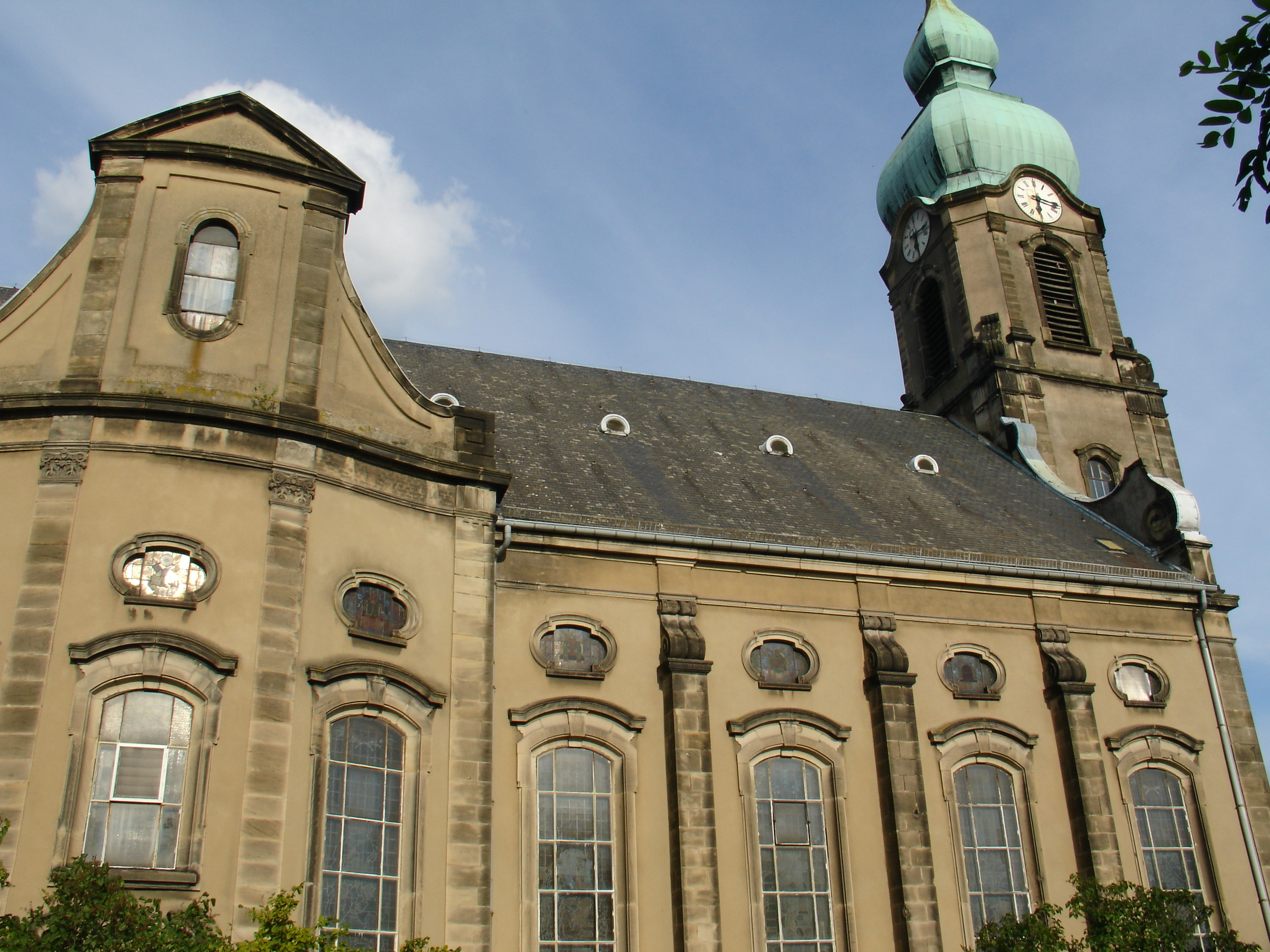 L'Église Saint-Maurice de Freyming-Merlebach (située dans le quartier de Freyming).